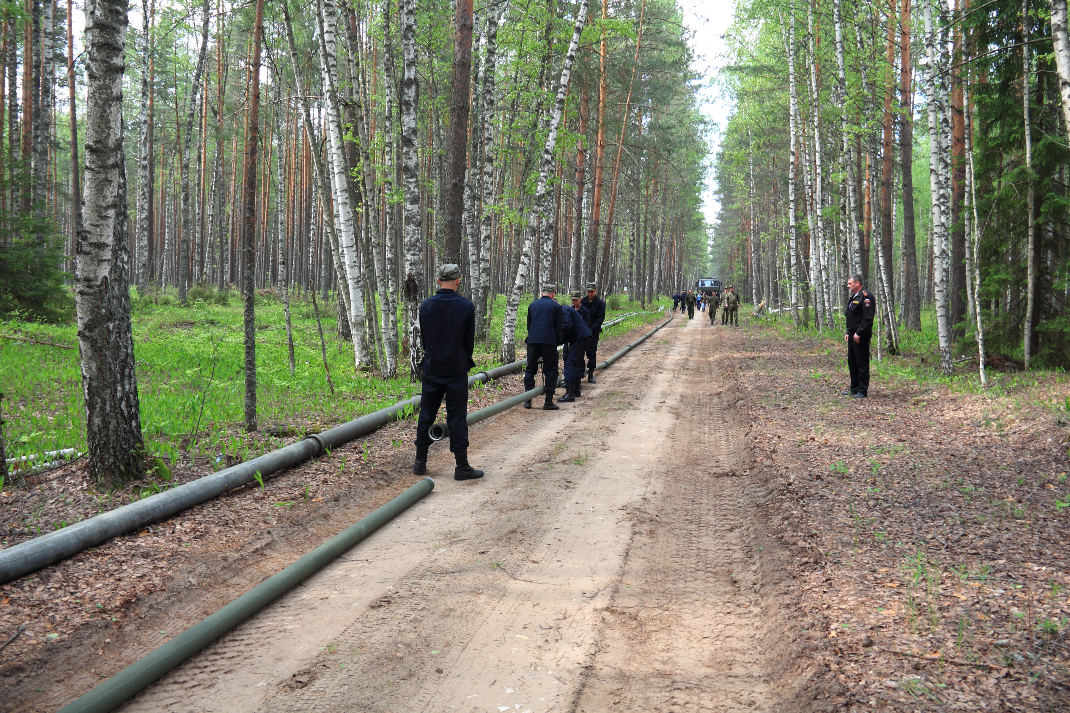 Монтаж полевого магистрального трубопровода силами трубопроводного батальона. Слева металлический трубопровод ПМТП-150 второго поколения. Справа (в процессе монтажа) - трубопровод ТСР-МК-100 третьего поколения.